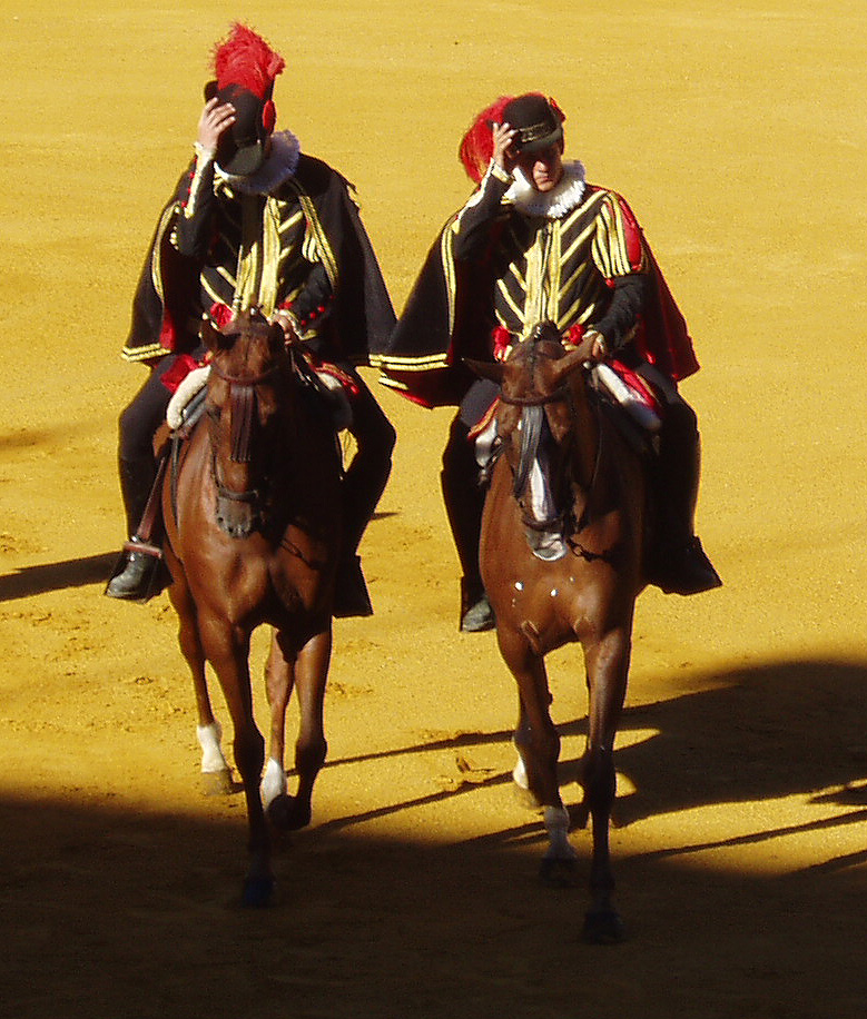 Pareja de alguaciles en la plaza de toros de El Puerto de Santa María, España.